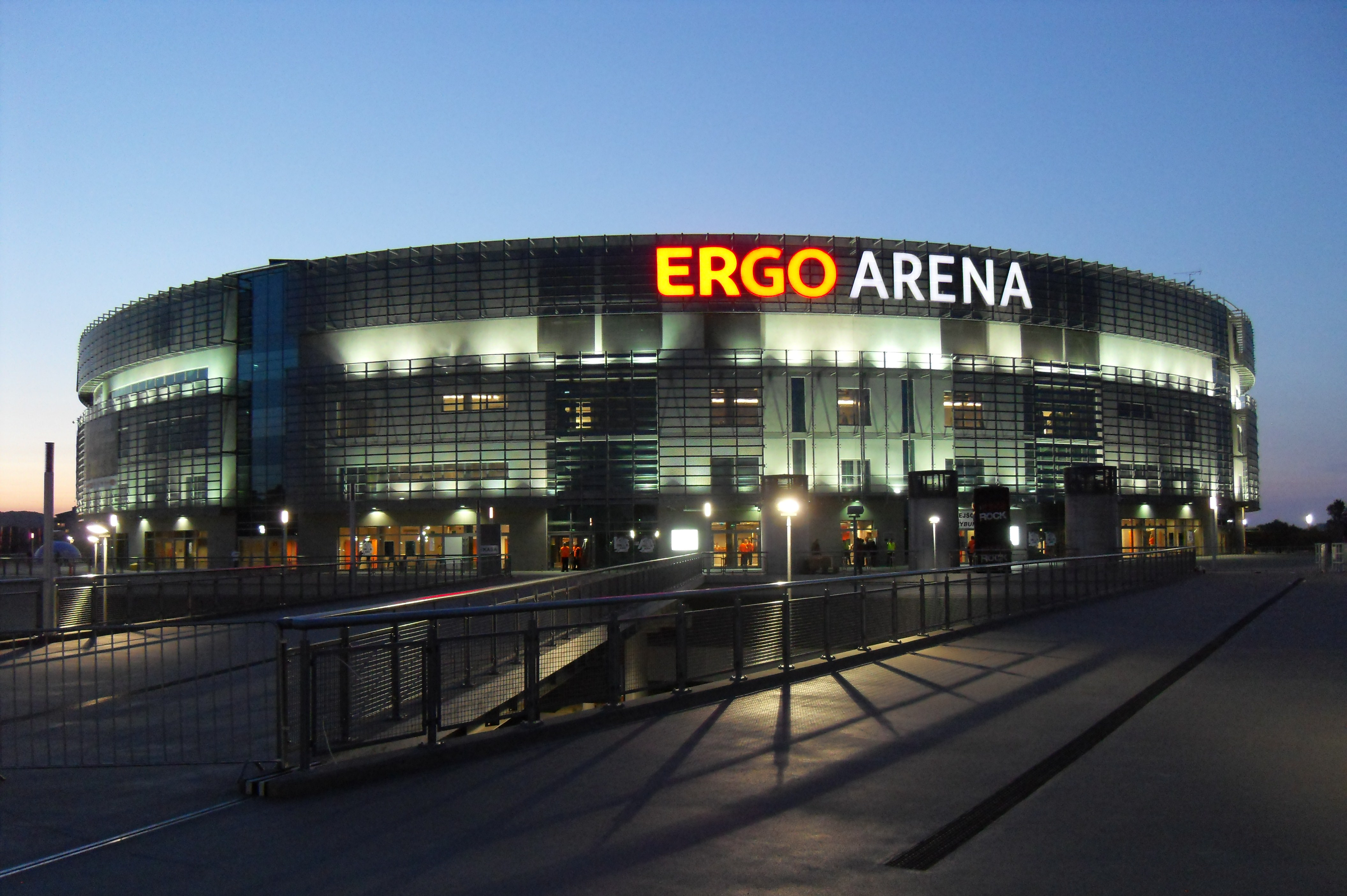 Hala Ergo Arena, na granicy Gdańska i Sopotu.